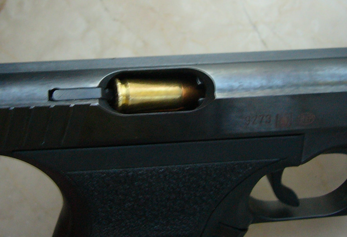 Ladehemmung bei einer Pistole Heckler & Koch P 7.